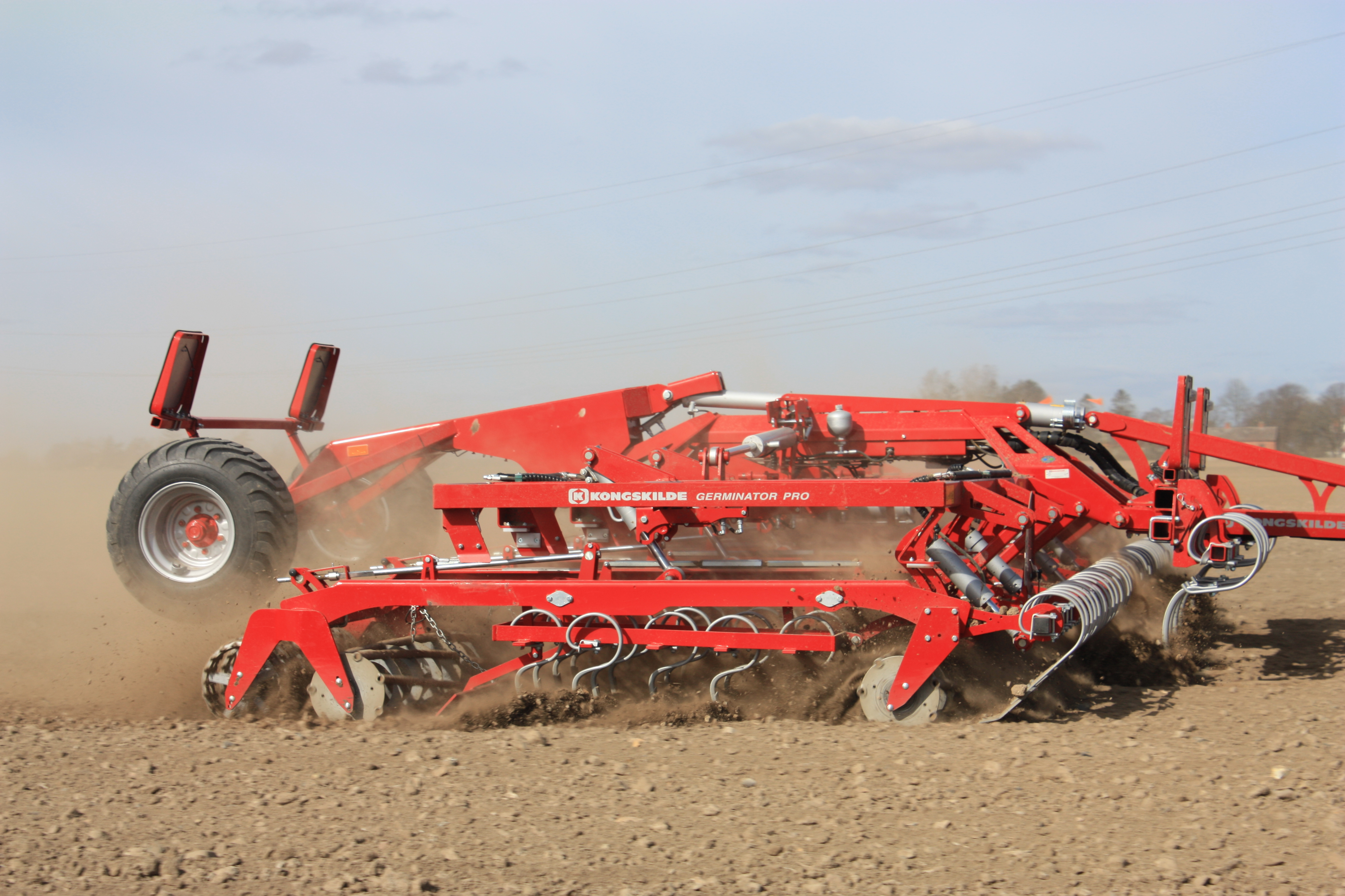 Germinator Pro